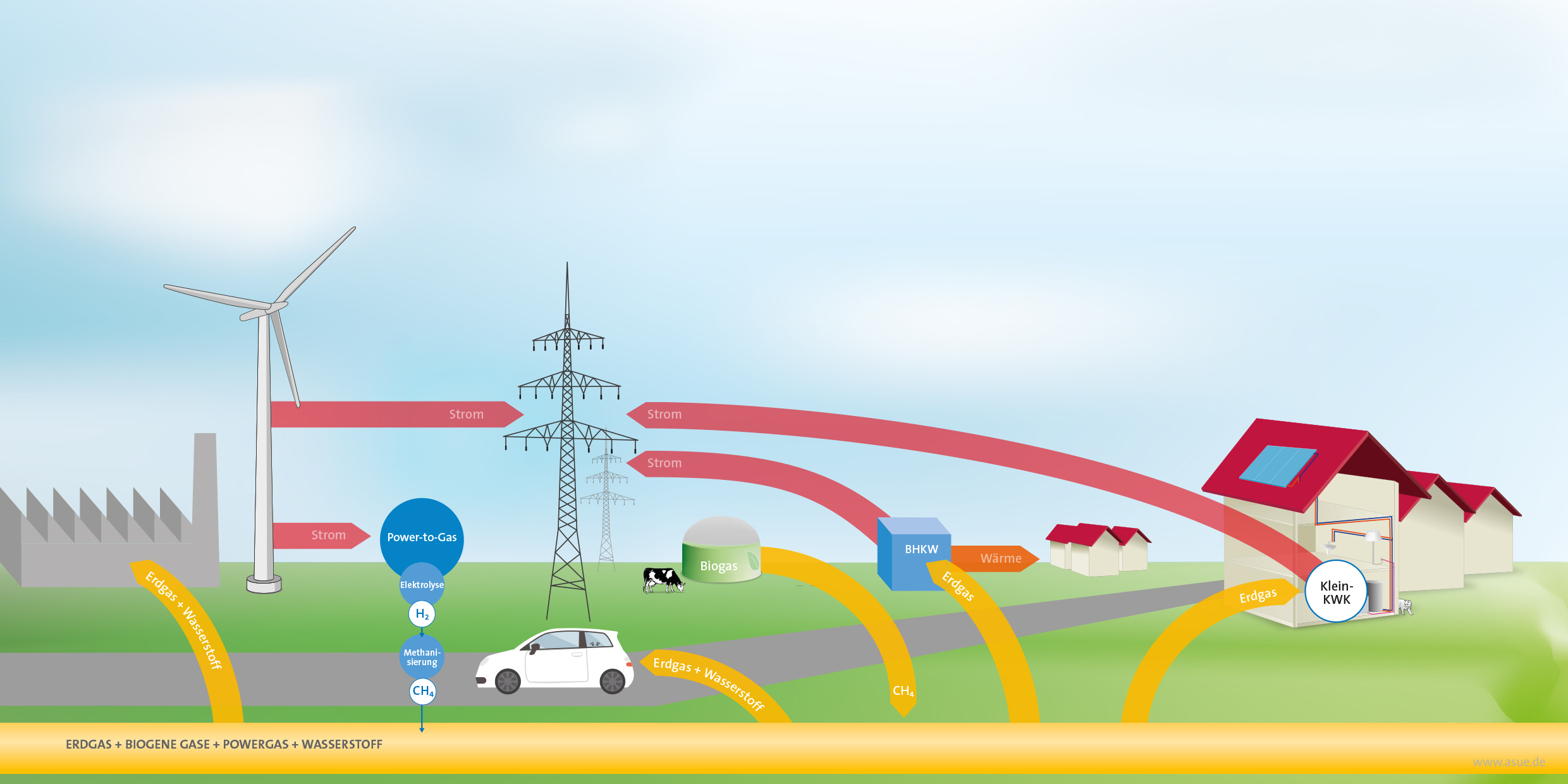 Die Grafik zeigt die für die Energiewende nötige Sektorenkopplung von Industrie, Bioenergie und Verbraucher über gemeinsam genutzte Gasnetze, in die auch Biogas eingespeist werden kann.